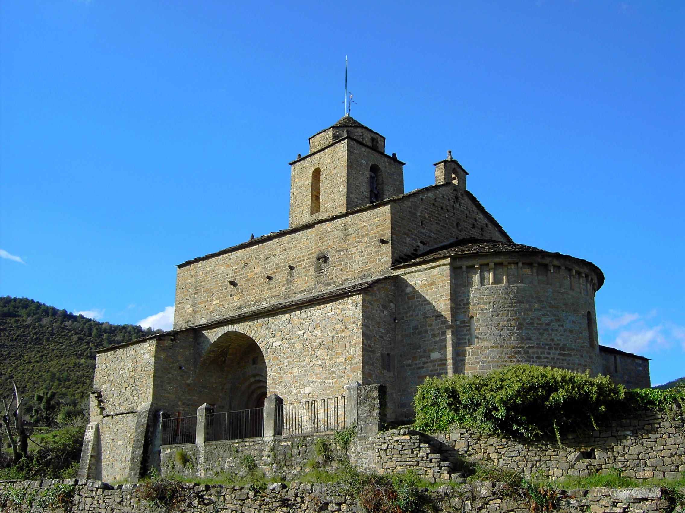 Aragonés: Ilesia de Sant Vicient d'A Buerda